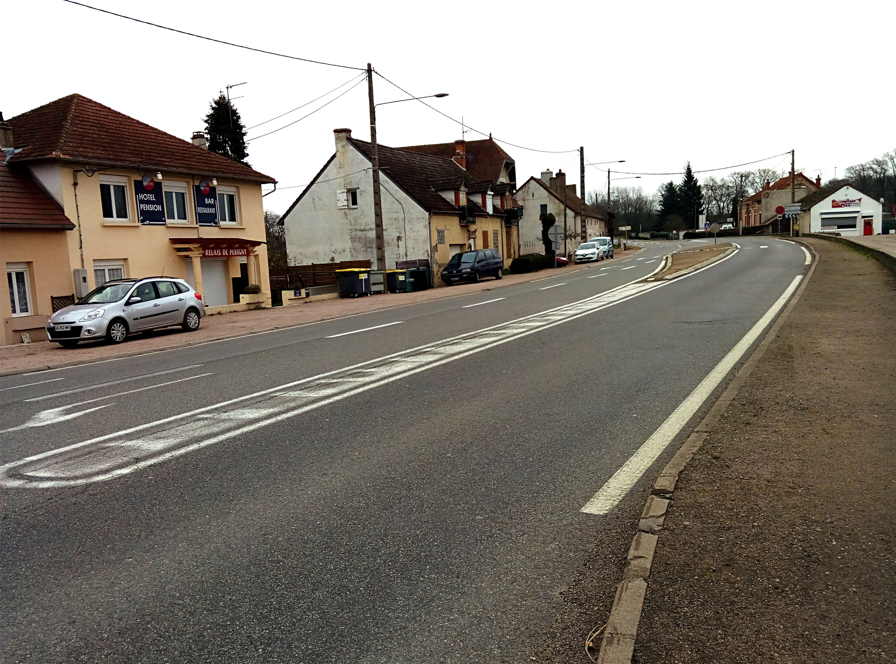 La route nationale 7 à Périgny, Allier, France.